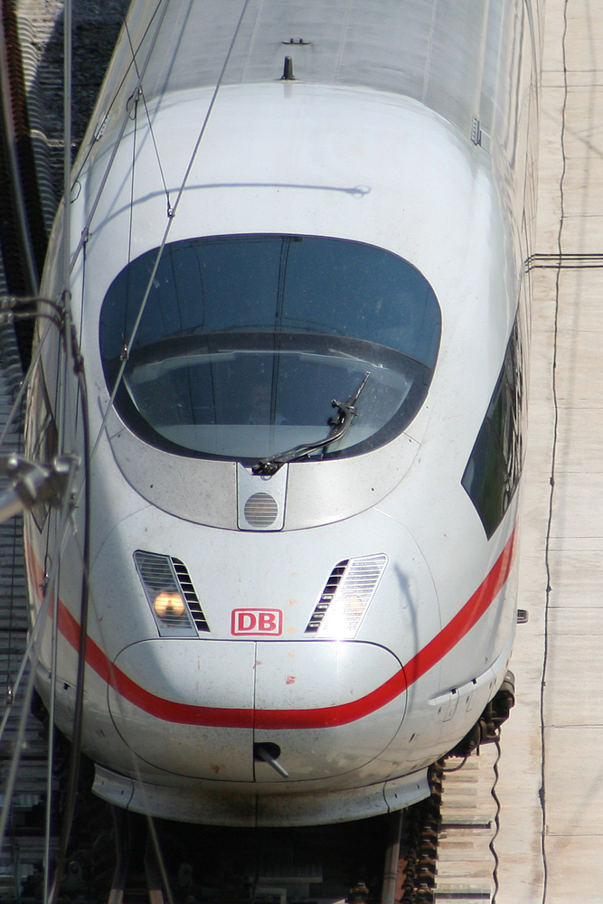 Blick auf den Lokführer eines ICE 3